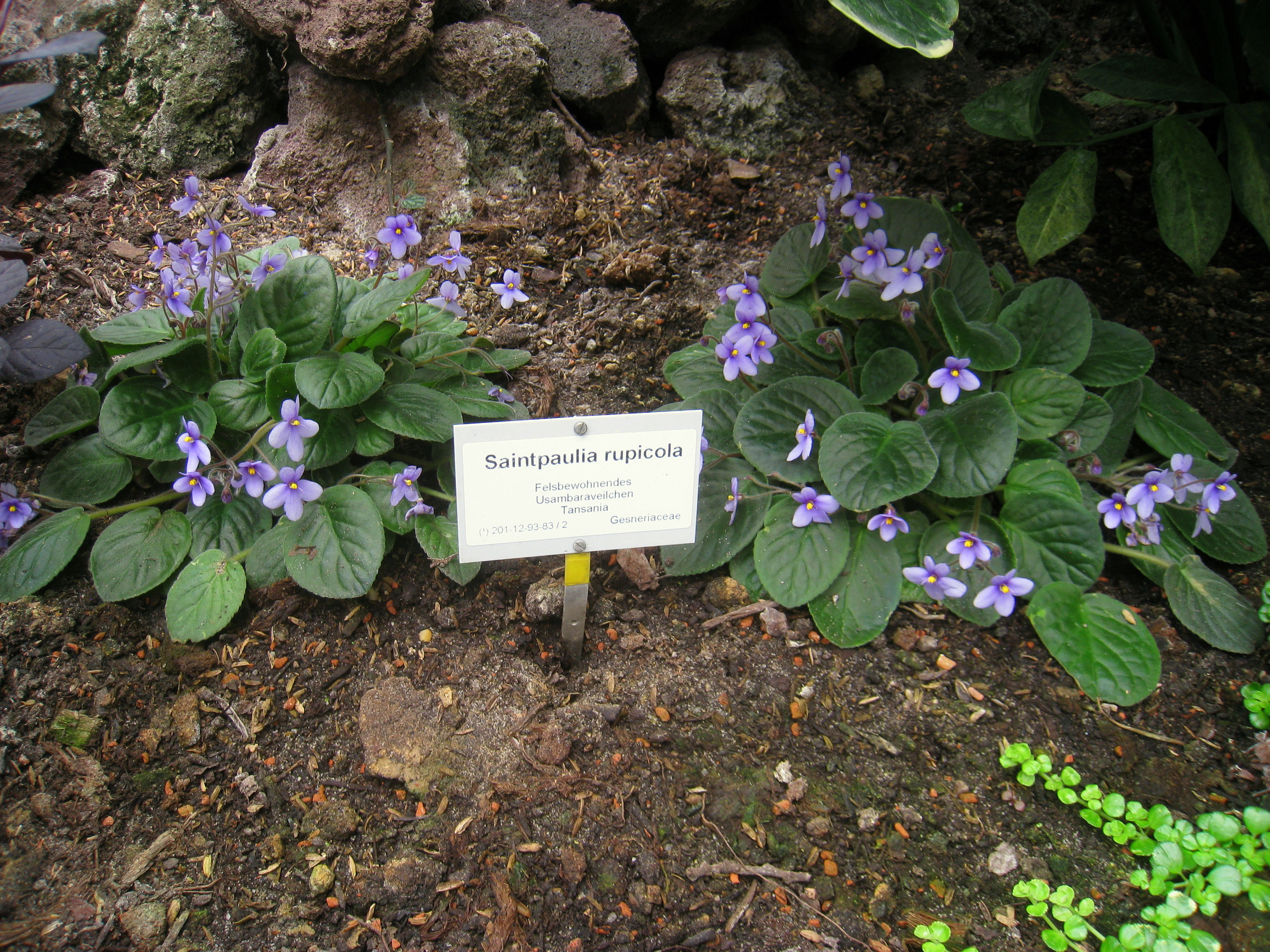 Saintpaulia rupicola specimen in the Botanischer Garten, Berlin-Dahlem (Berlin Botanical Garden), Berlin, Germany.